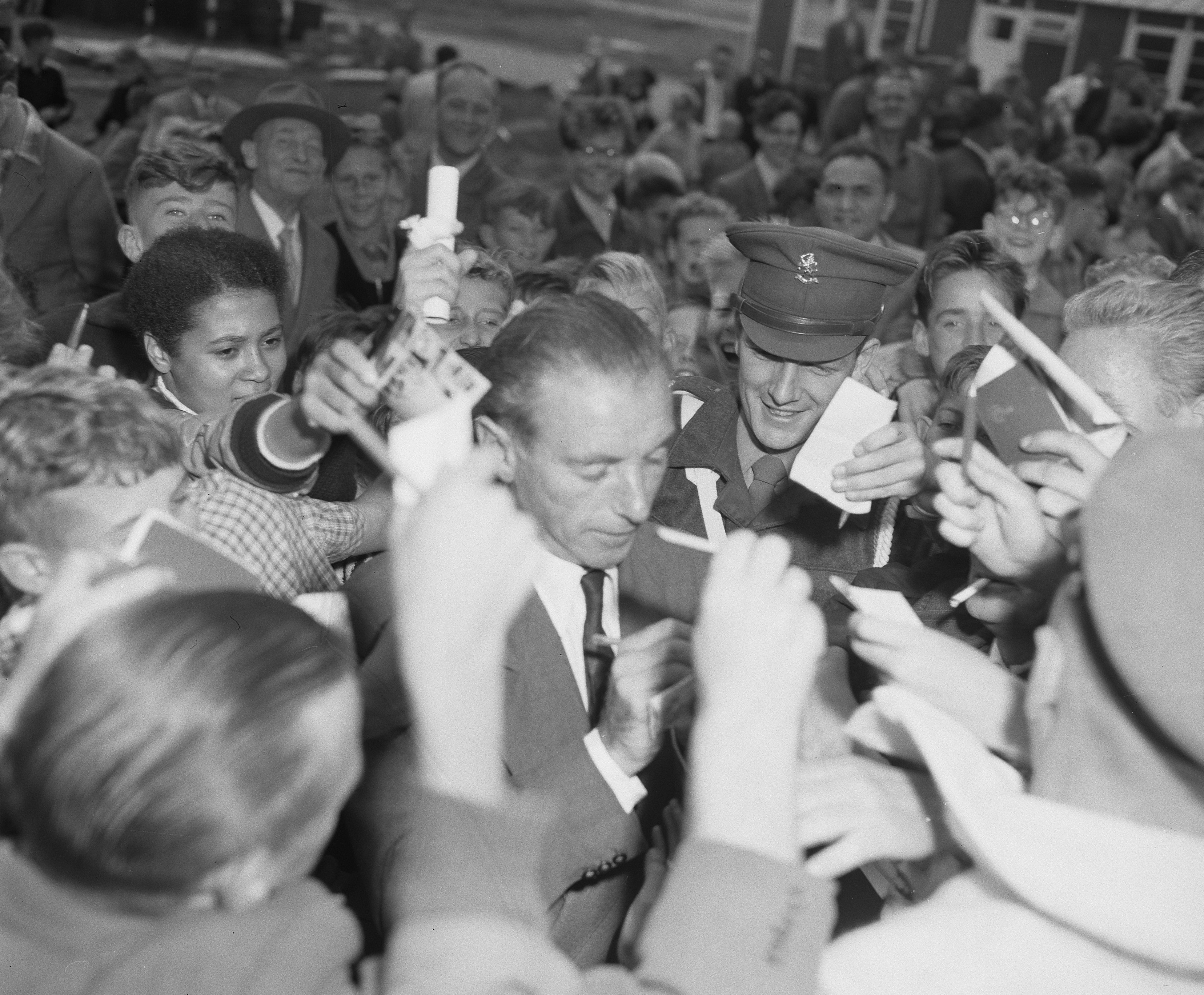 Aankomst Stanley Matthews op Zestienhoven. Geeft handtekeningen Datum 13 augustus 1957